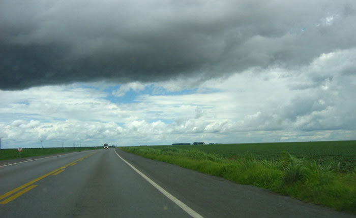 BR-020 após Luiz Eduardo-BA, sentido Brasília. Highway BR-020 after Luis Eduardo, Bahia, direction to Brasilia, Brazil. 22/01/2011 11:53